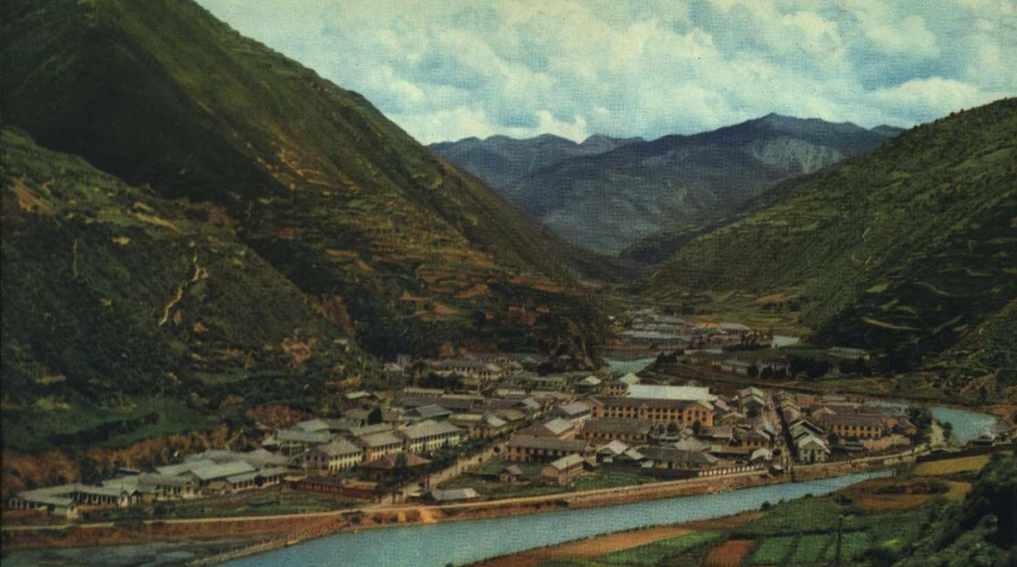 1963-12 1963年 四川阿坝州府马尔康